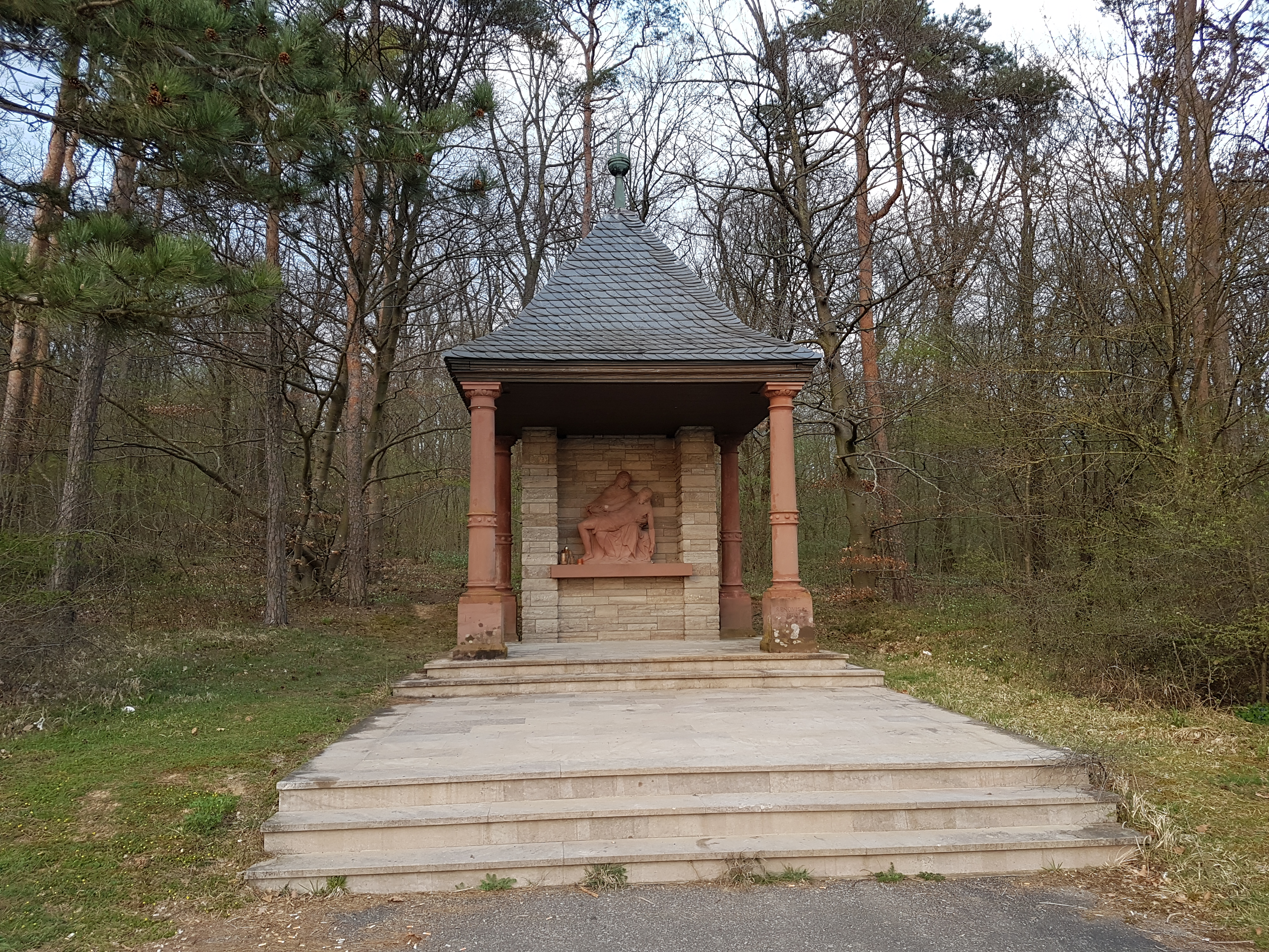 Kapelle am Hammberg in Tauberbischofsheim beim Trimm-dich-Pfad